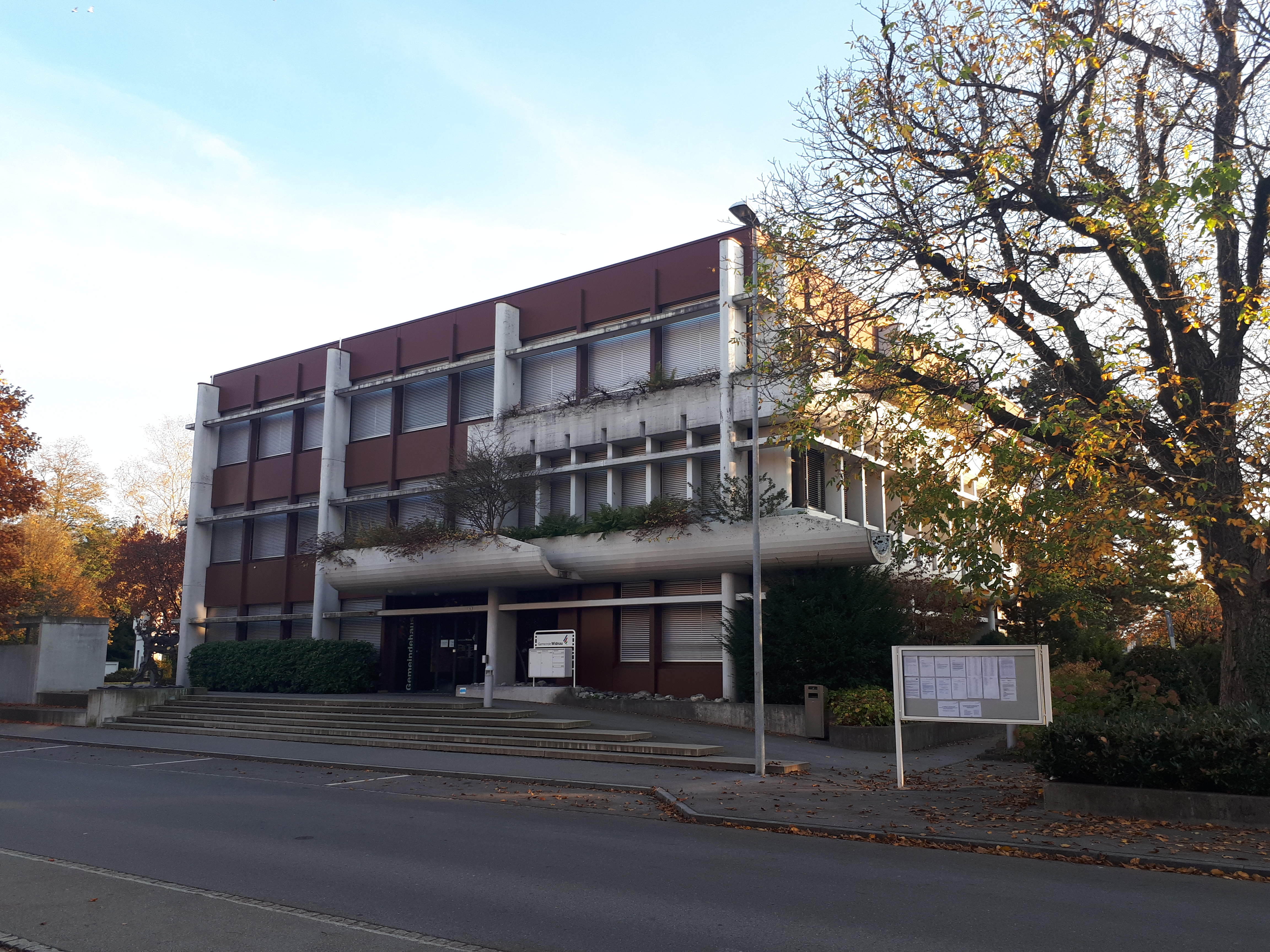 Das Gemeindehaus von Widnau Ansicht von Norden